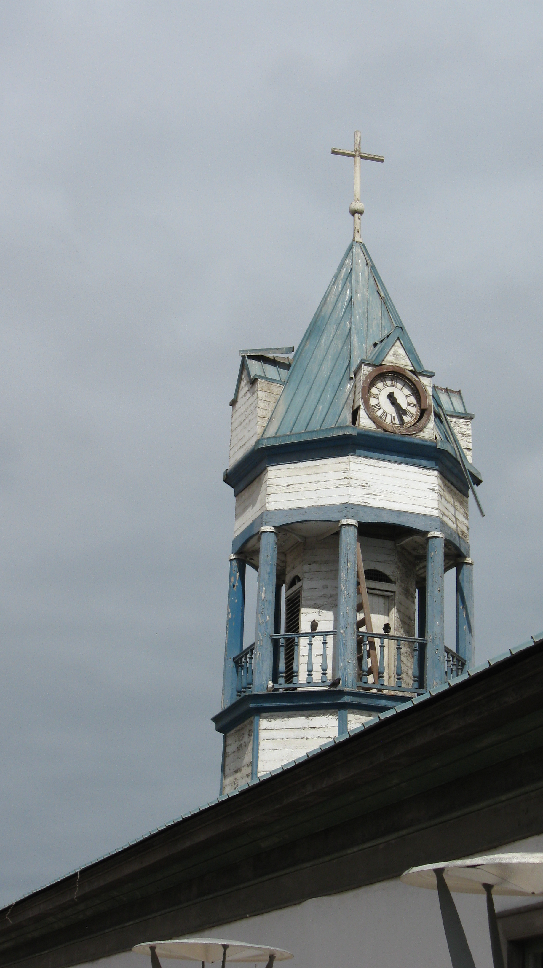 Iglesia de Chañaral This is a photo of a national monument in Chile: 326